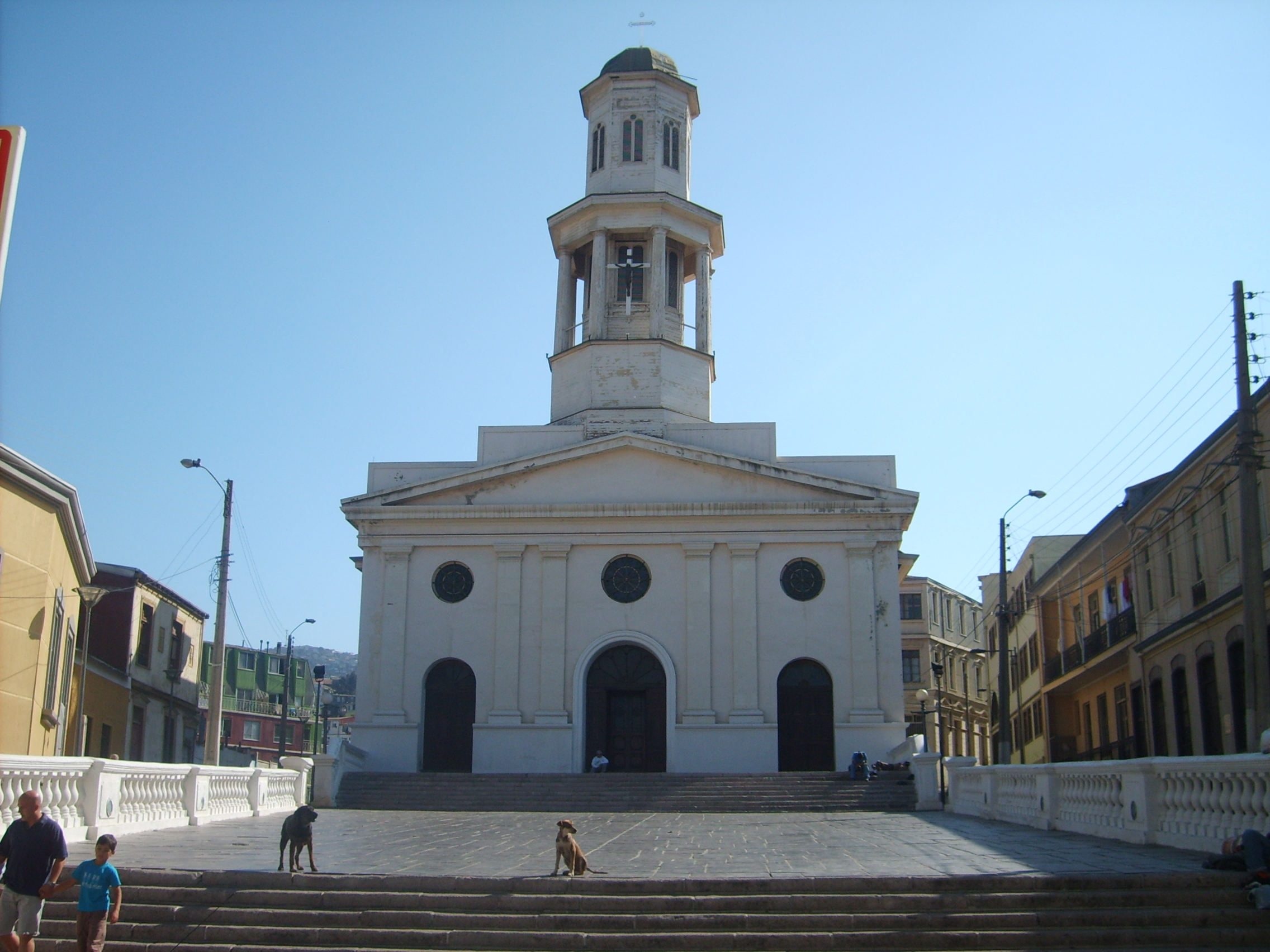 Iglesia de la matriz ubicada en la ciudad de valparaiso ,Chile